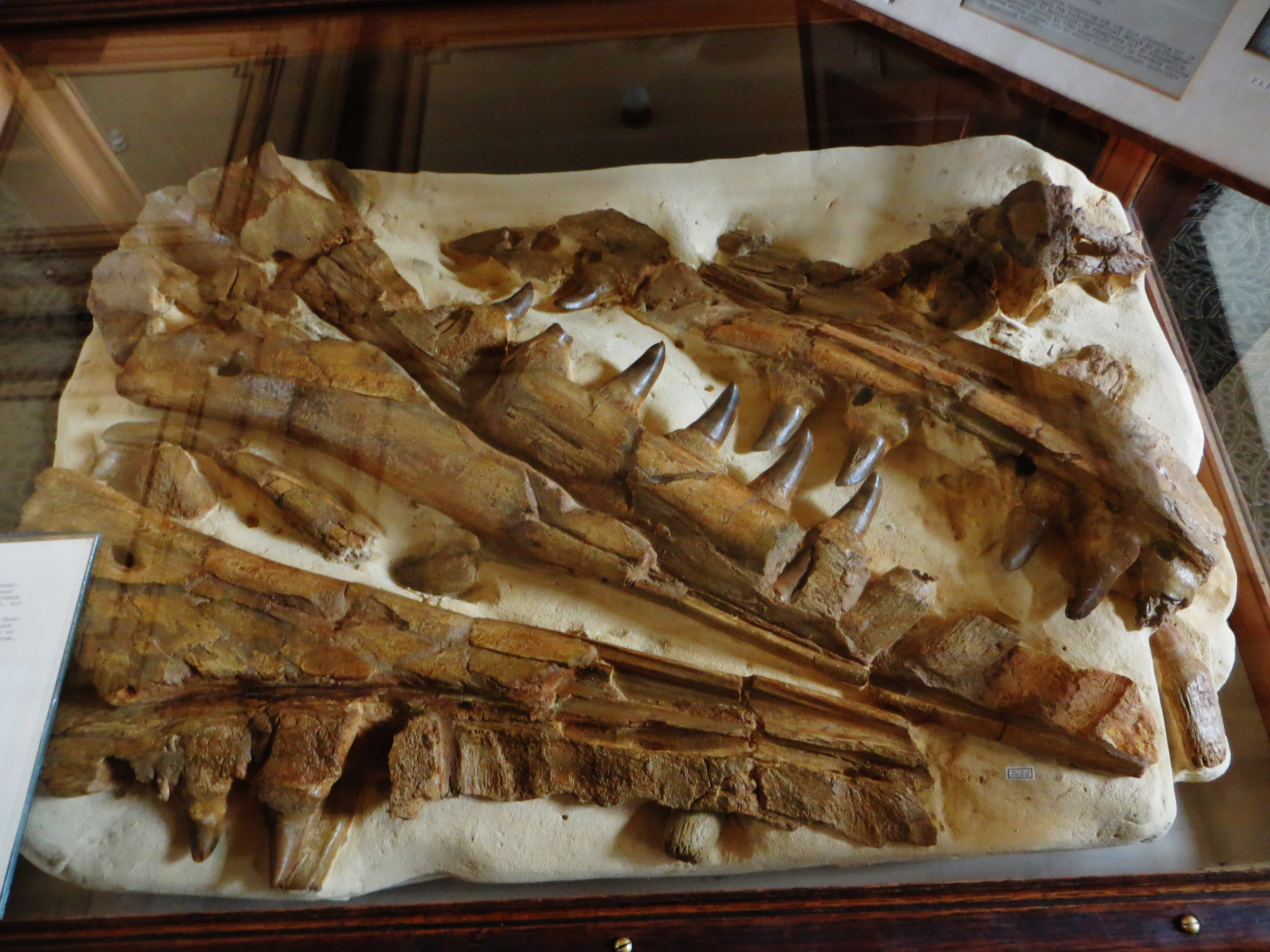 Fossil mosasaur - Took the picture at Teylers Museum, Haarlem